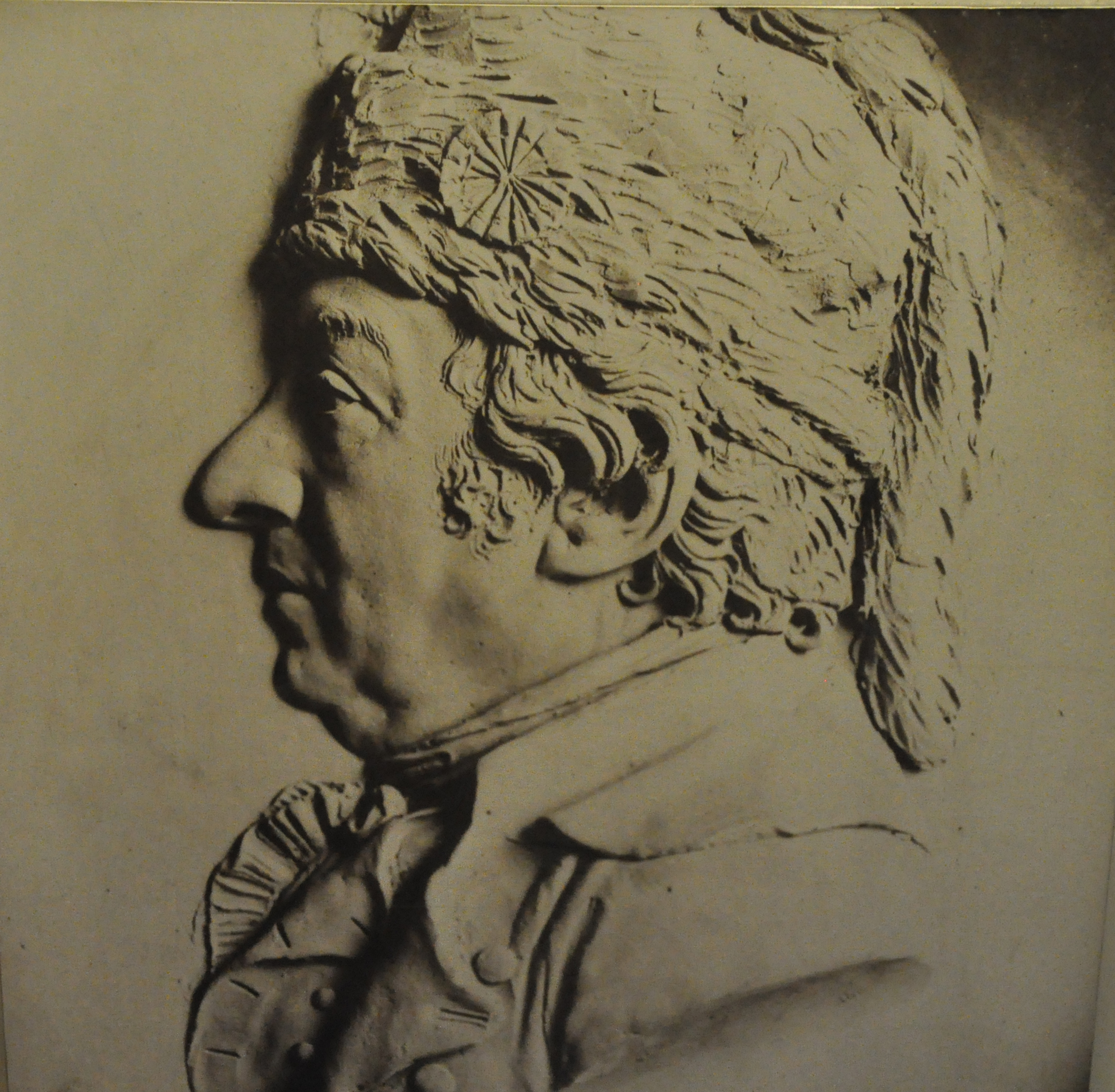 Bas-relief de Joseph Chinard représentant Philippe-Égalité, musée de la Conciergerie à Paris